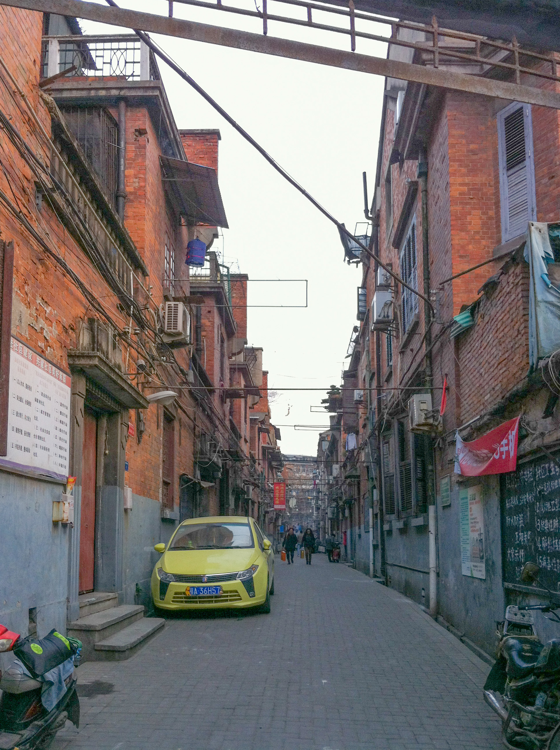 中文（中国大陆）: 洞庭村，汉口鄱阳街，景明大楼斜对面